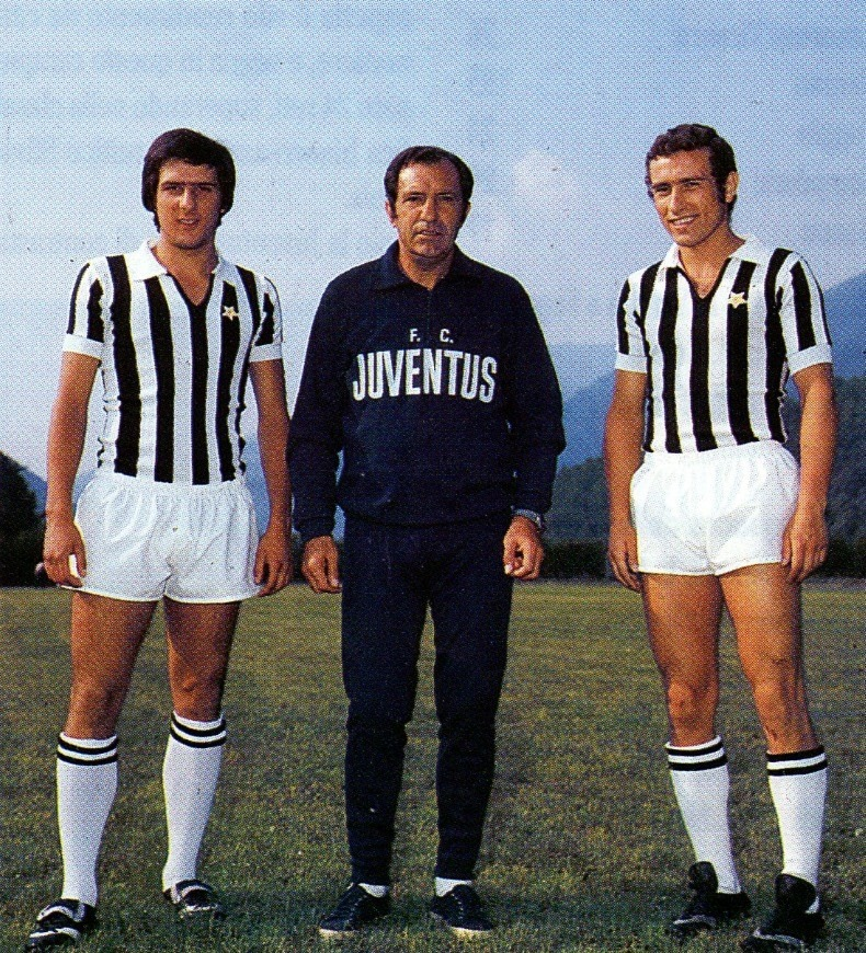 Villar Perosa, estate 1974. Il nuovo allenatore della Juventus, Carlo Parola, posa tra i due neoacquisti della squadra per la stagione 1974-75, il libero Gaetano Scirea (a sinistra) e l'ala Oscar Damiani (a destra), durante il ritiro precampionato.